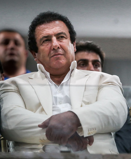 کیومرث هاشمی (راست) و گاگیک تساروکیان (چپ) افتتاحیه چهل وهشتمین دوره مسابقات المپیک ارامنه ایران مراسم افتتاحیه چهل وهشتمین دوره مسابقات المپیک ارامنه ایران عصر سه شنبه با حضور یونسی دستیار رییس جمهور در امور اقلیت ها دینی در باشگاه ارارات برگزارشد.